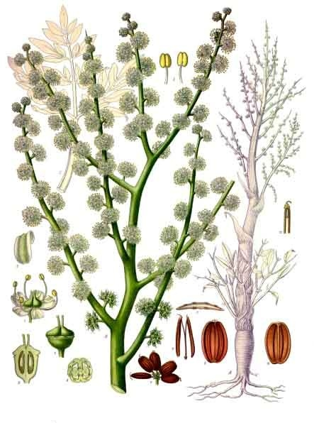 Ammoniakpflanze. A blühende Pflanze, sehr verkleinert; B Spitze des blühenden Stempels, natürl. Grösse; 1 Blüthe, vergrössert; 2 Staubgefässe, desgl.; 3 Kronblatt, von der Rückseite, desgl.; 4 Stempel, desgl.; 5 derselbe im Längsschnitt, desgl.; 6 Fruchtknoten im Querschnitt, desgl.; 7 Früchte, natürl. Grösse; 8 Spaltfrucht mit dem 2theiligen Säulchen, vergrössert; 9, 10 Theilfrüchtchen von der Rücken- und Bauchseite, desgl.; 11 Theilfrüchtchen im Querschnitt, desgl.; 12 Spitze eines längsdurchnittenen Theilfrüchtchens, desgl.